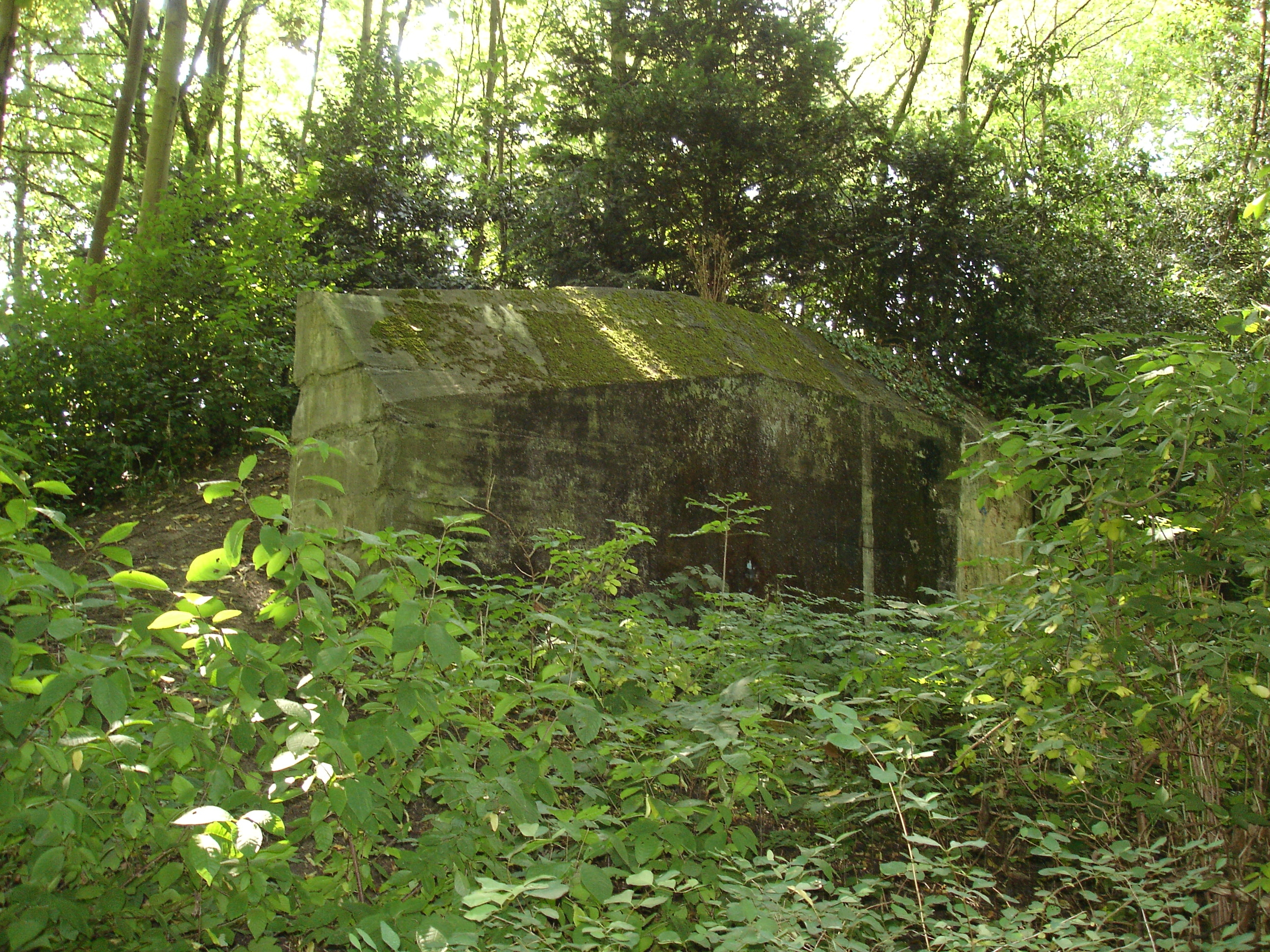 Bunker Goetlijfpark, nabij Goetlijfpad, Den Haag